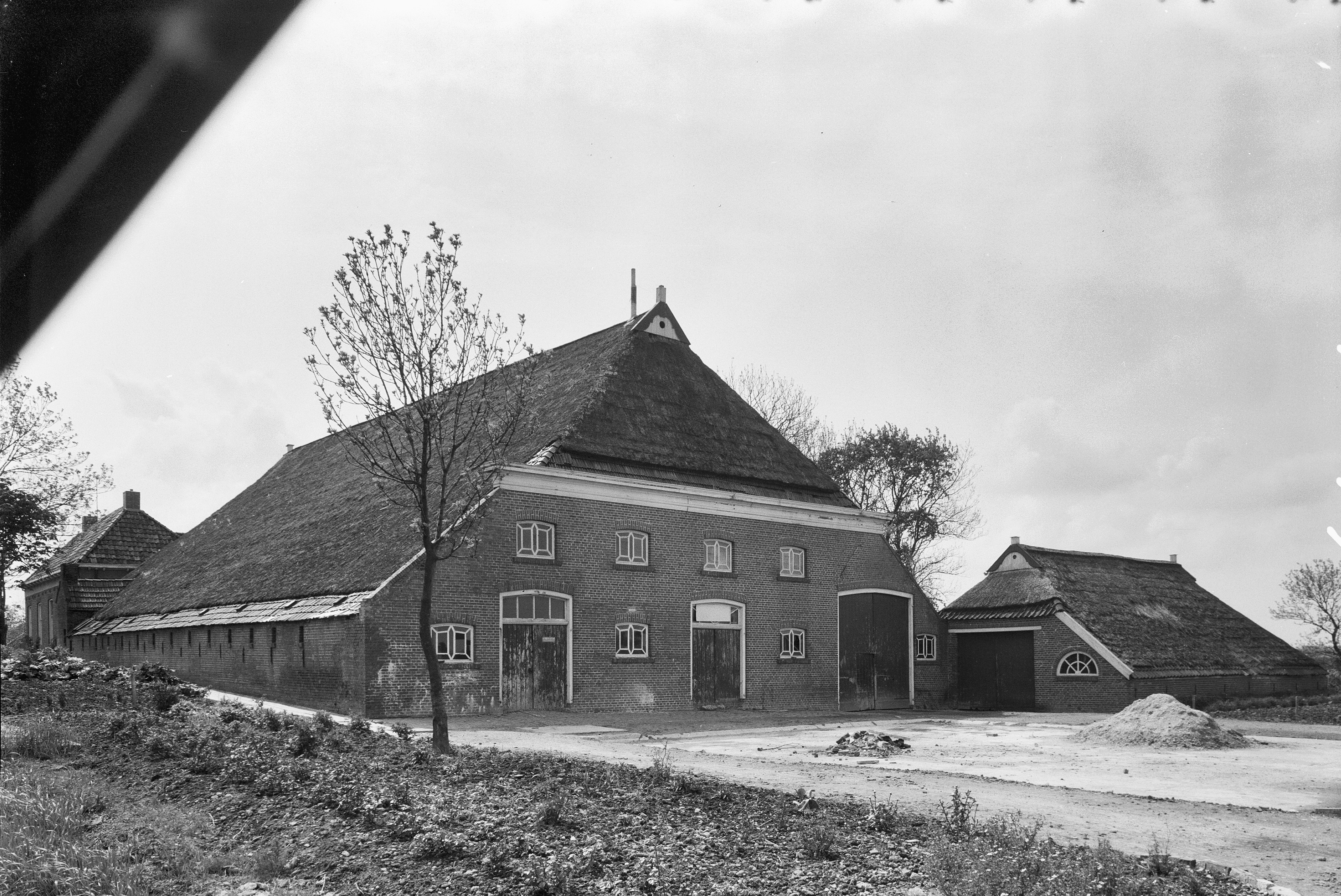 Diversen: Boerderij F.61, voor- en achtergevel This is a possible Rijksmonument:Find the monument in the Monuments database:in BiessumAll Rijksmonumenten in BiessumIs this a Rijksmonument?YesNoMore information about this project and help. More images to work at in Category:Possible Rijksmonumenten.